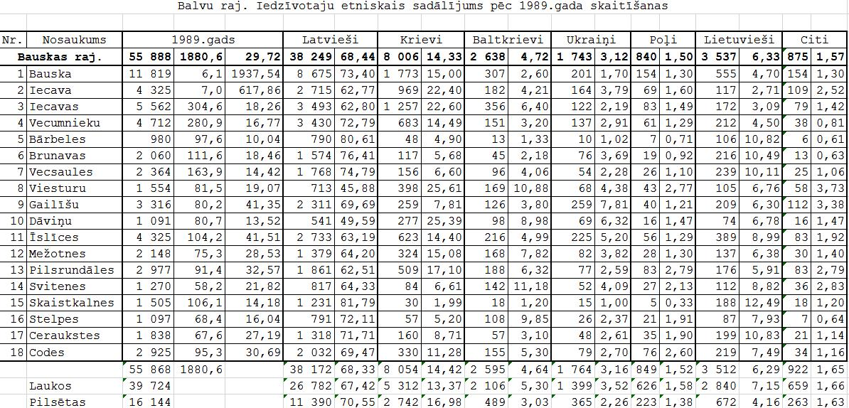 Этнический состав населения Латвии по переписи 1989 года